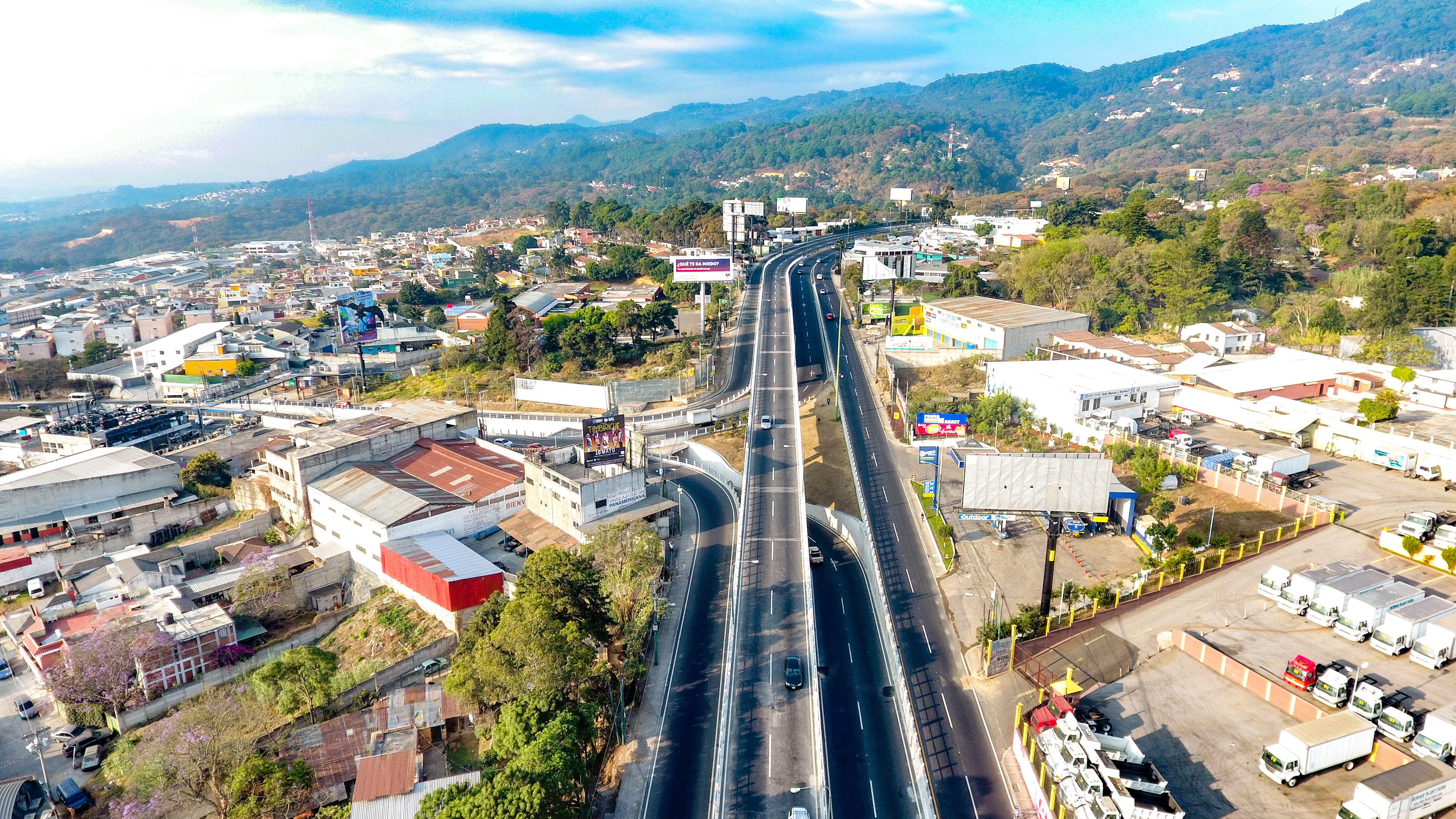 El Distribuidor vial se concluyó en el año 2007, fue gestionado y construido pensando en la urgente necesidad de viabilizar el tránsito de occidente, San Lucas, Chimaltenango, Ciudad San Cristóbal y Mixco.